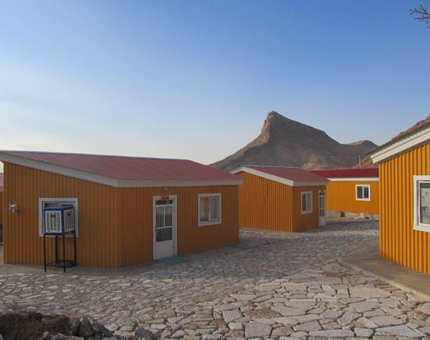 سوئیت های اقامتی غار